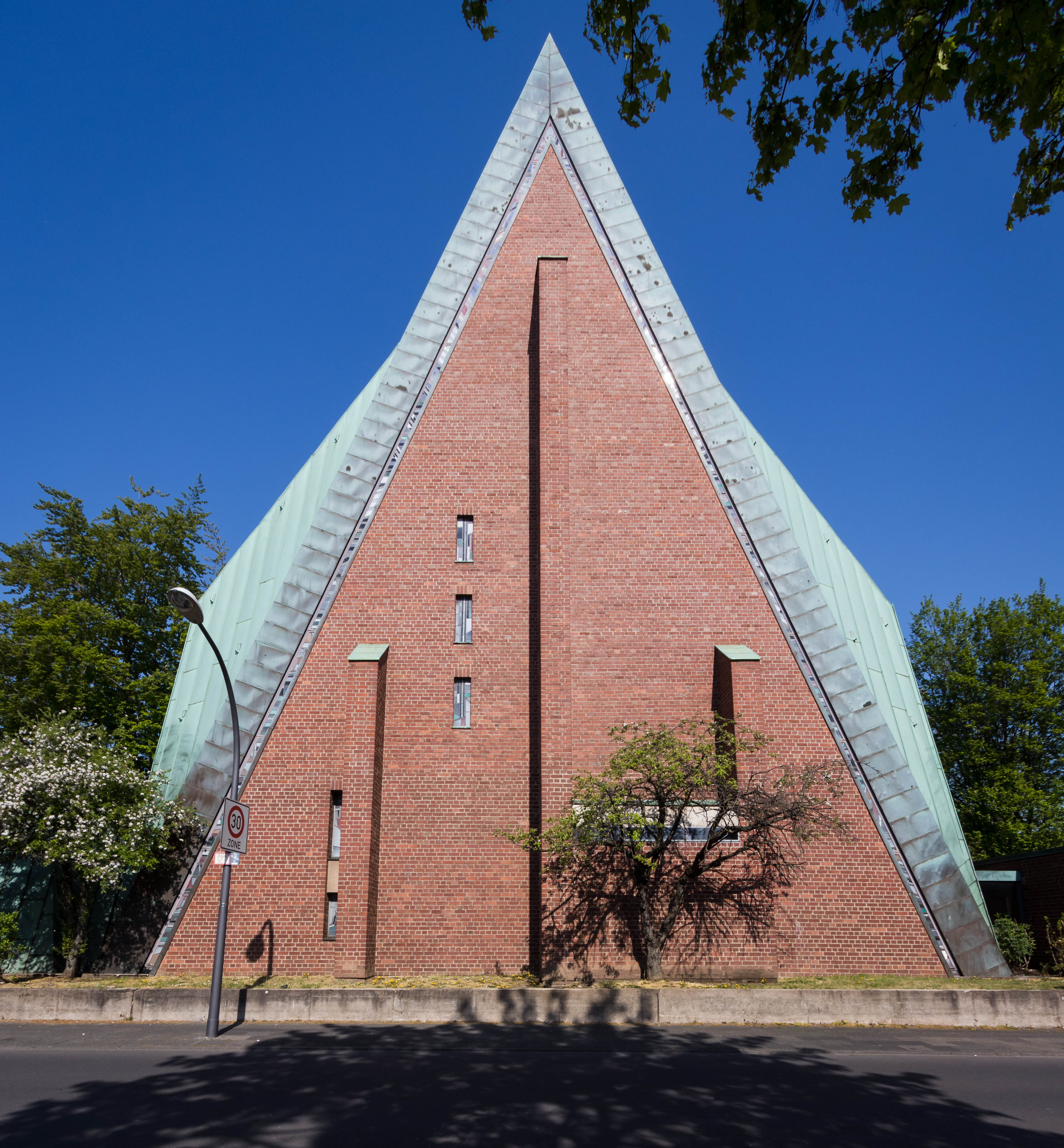 St. Johannes der Evangelist (Köln-Stammheim), Architekt: Karl und Gero Band; seit 2018 zur Profanierung und Abriss vorgesehen.